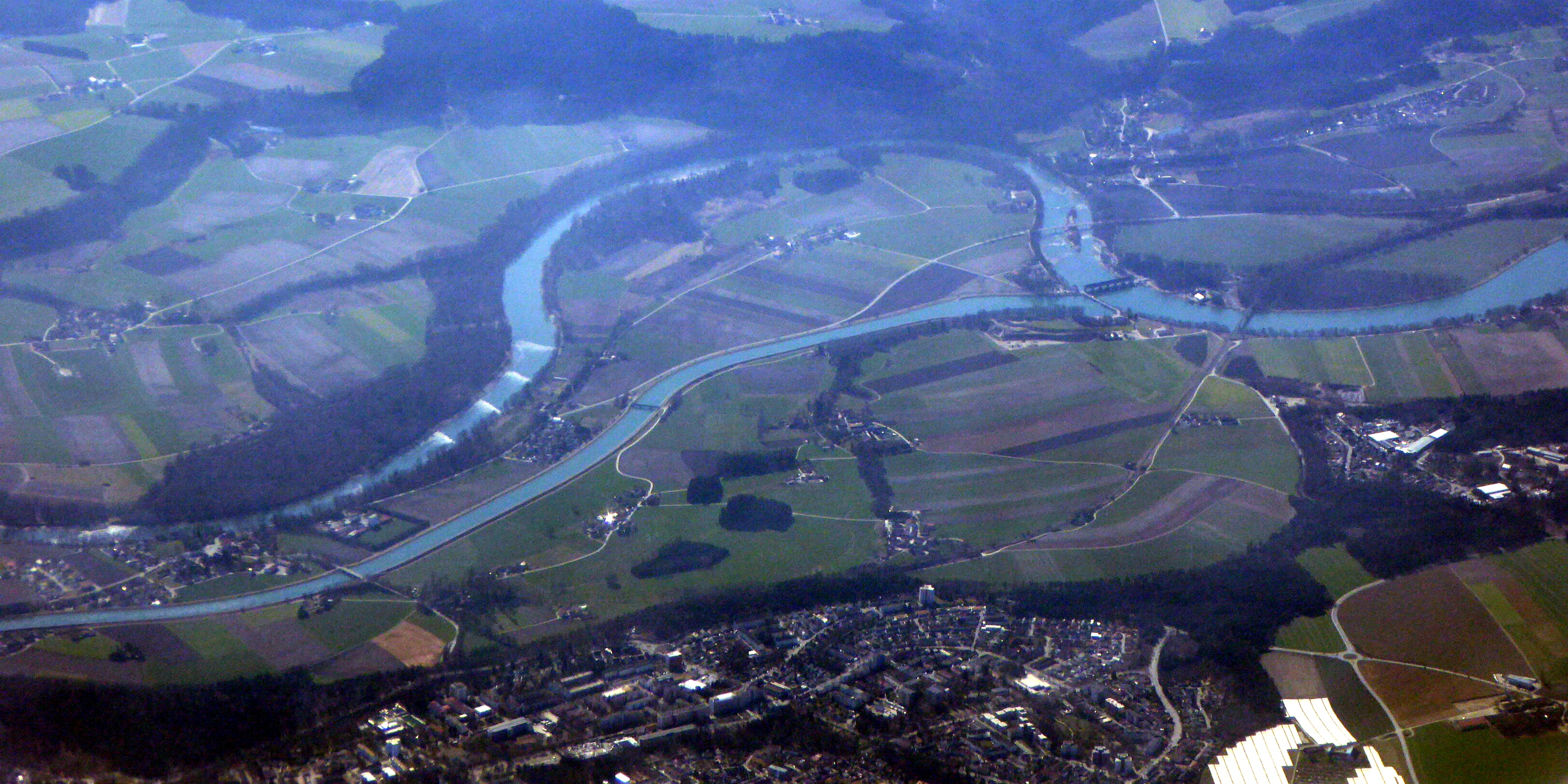 Boarisch: Da Inn und da Innweakkanoi, wiara bei Jettnboch links aussigleidt wead.